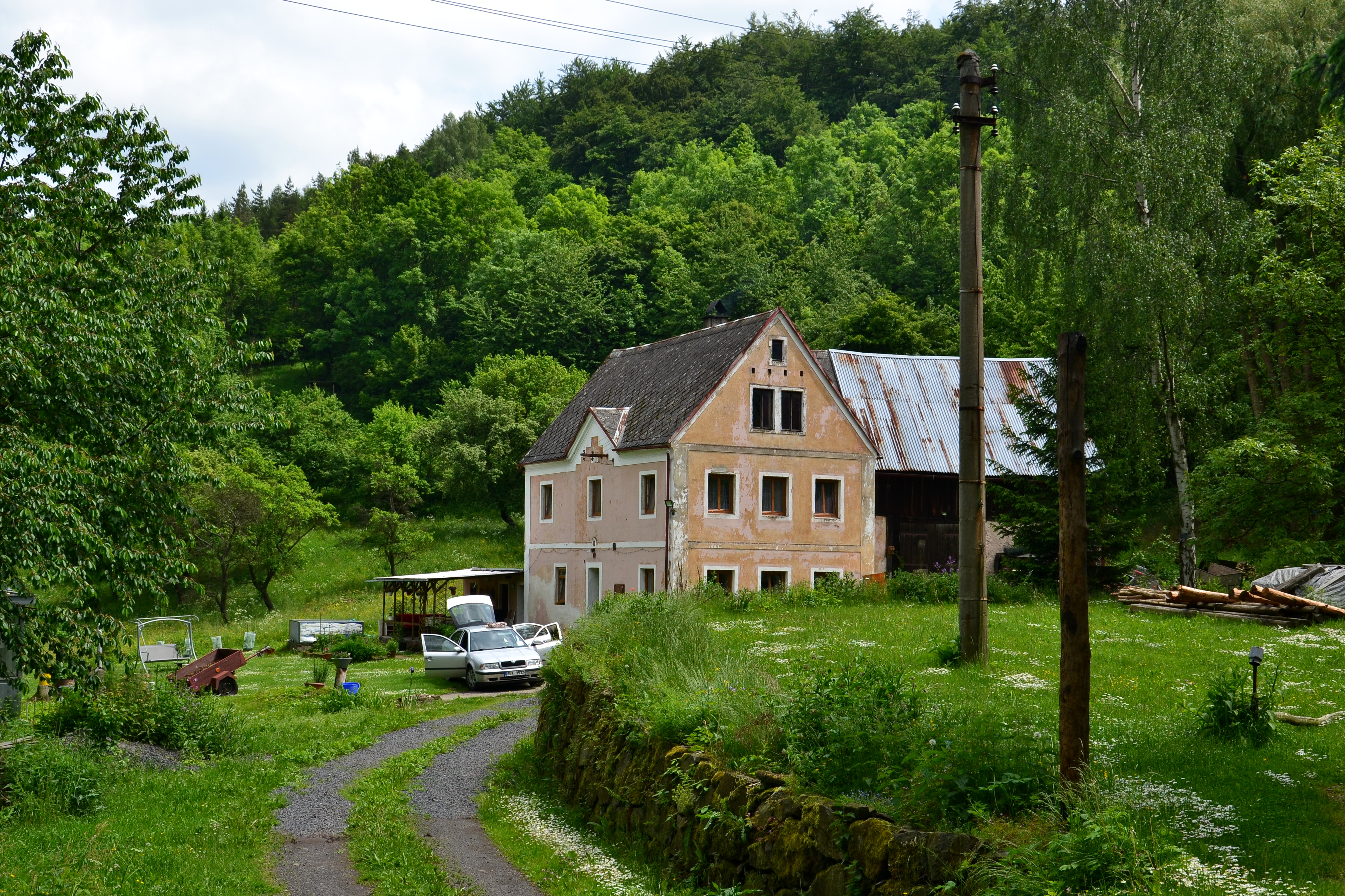 Dům čp. 5